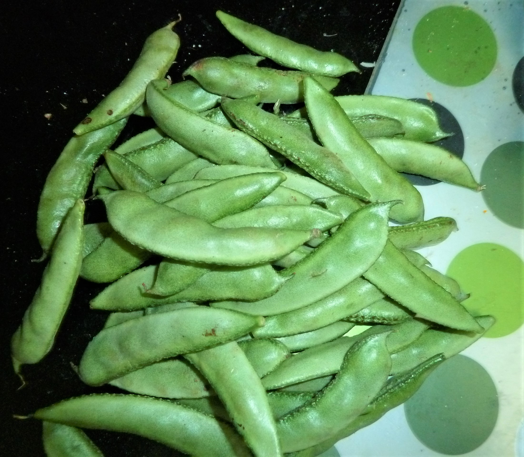 చిక్కుడు కాయలు